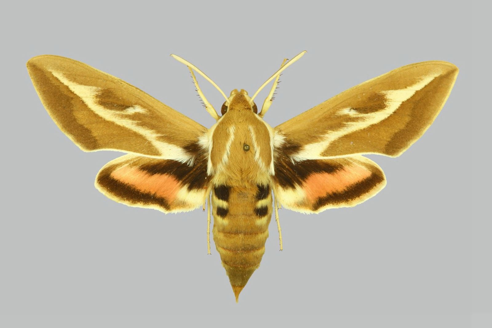 Hyles zygophylli, female, upperside. Turkmenistan, Oase Tedschen, Fluss Herikud, westl. von Merv